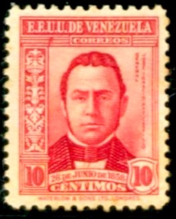 80 aniversario de la impresión de la primera estampilla postal venezolana año 1939. Impresa por Waterlow & Sons, Londres. Perforacion 12 1/2. Nº de catálogo * según Aurelio Blanco:338 Blanco, Aurelio. 2009: Venezuela Catálogo especializado de estampillas. Caracas. 183p. ISBN 980-300-176-0